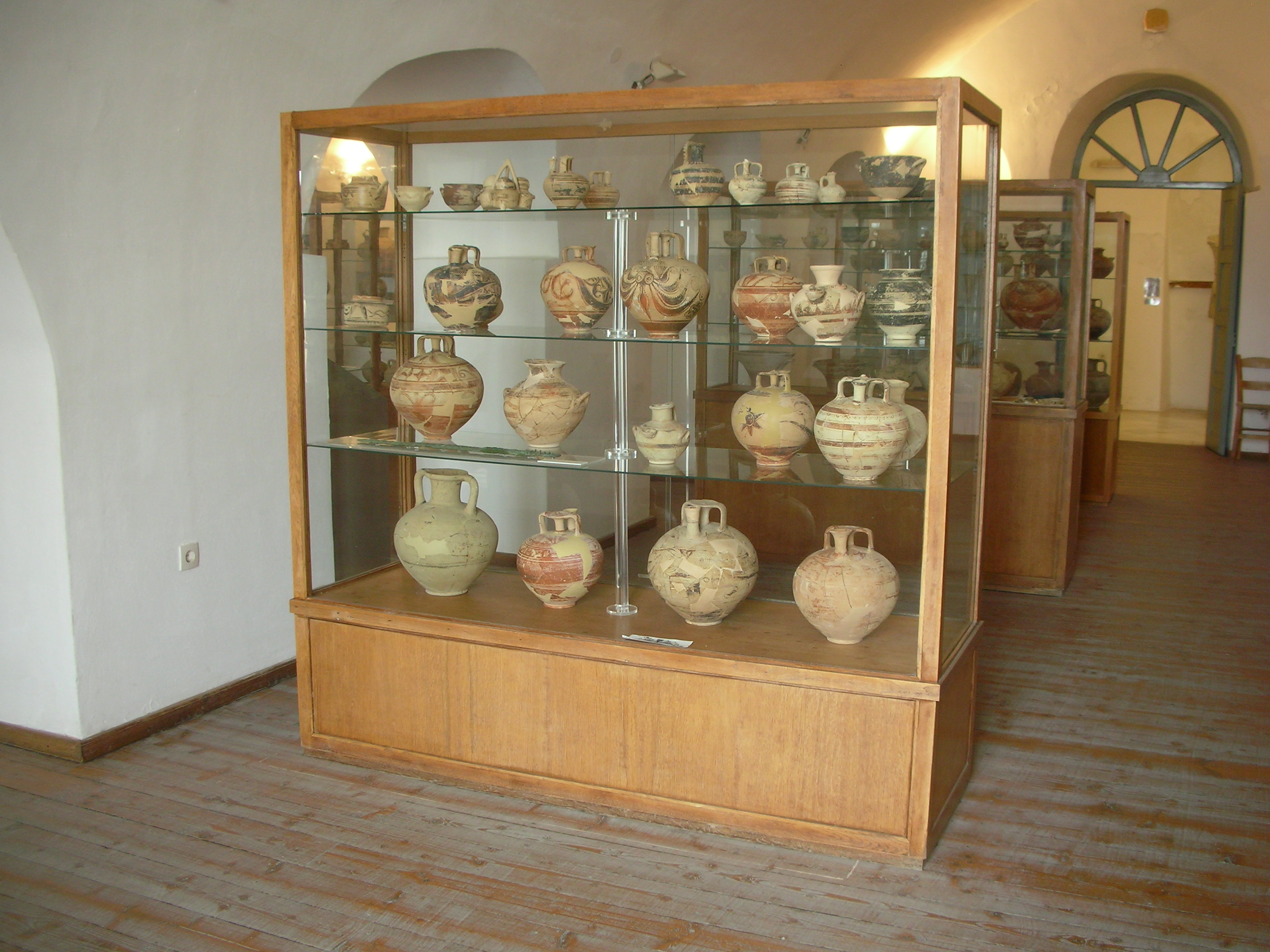 Archäologisches Museum Naxos, Mykenische Bügelkannen, Raum IV